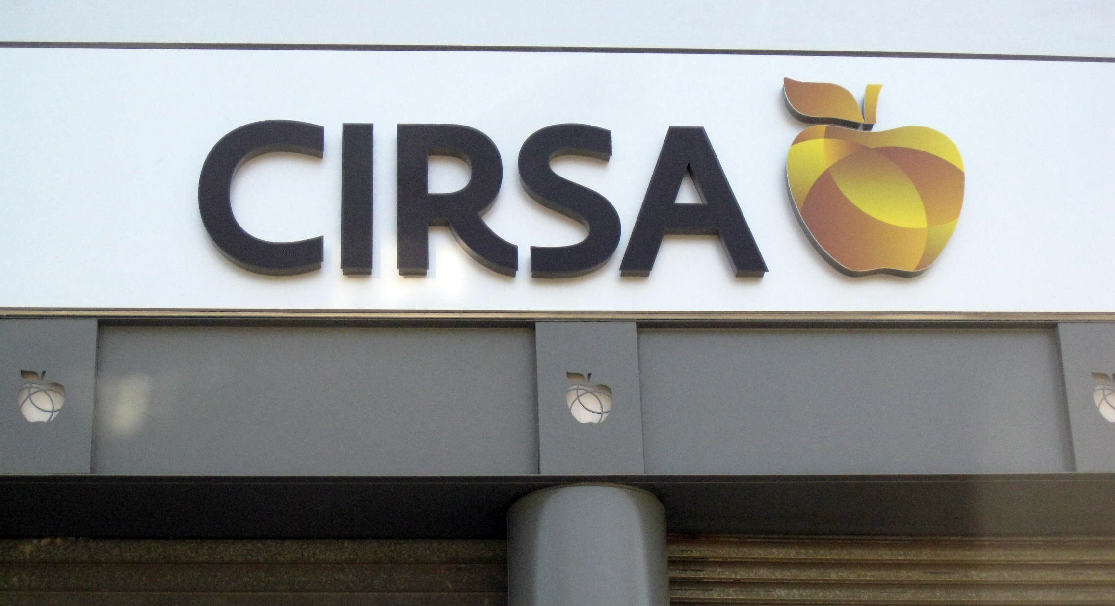 Cirsa, carretera de Castellar (Terrassa)